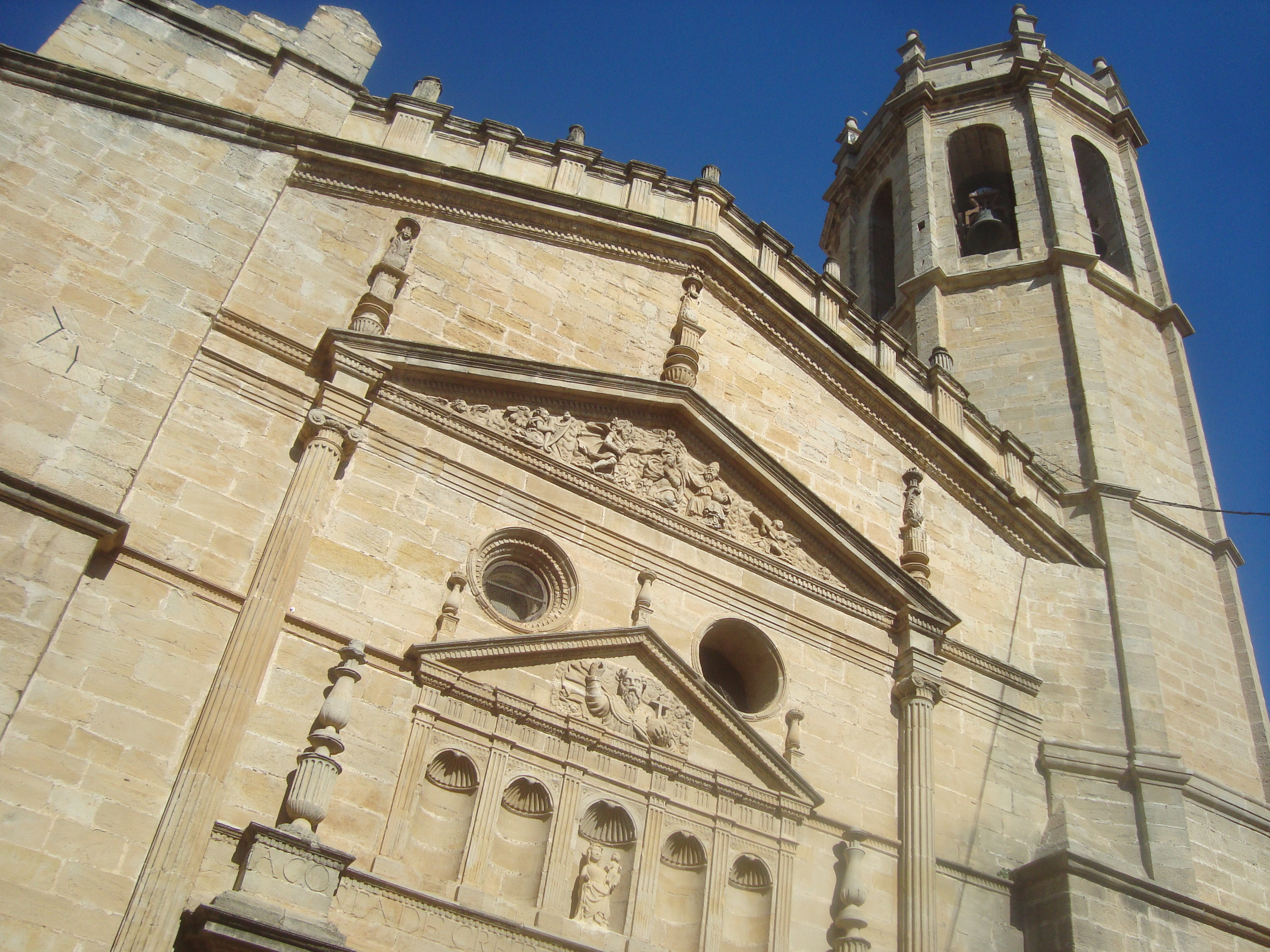 Iglesia Parroquial de la Asunción de Cretas (Teruel)